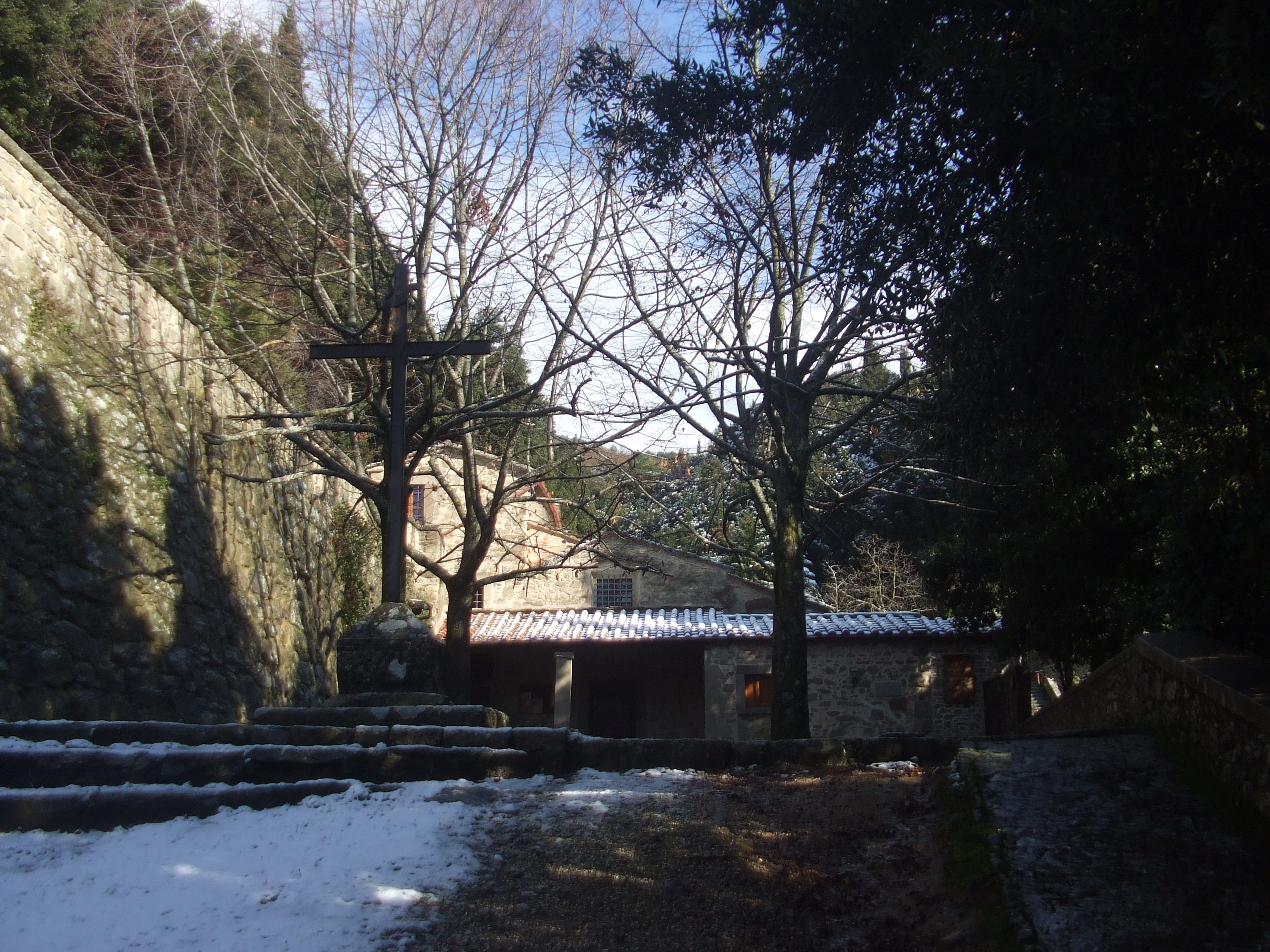 La chiesa delle Celle